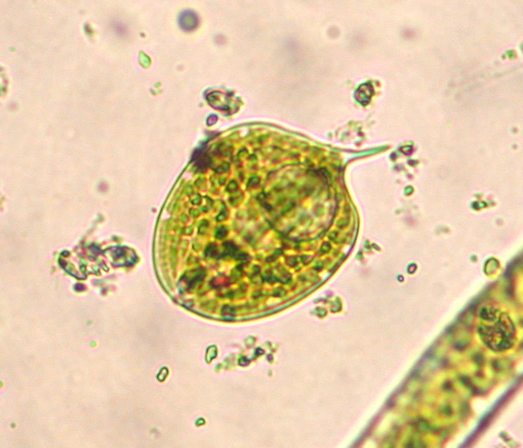 Phacus：ウチワヒゲムシ 2008/05/16 和歌山県田辺市：Tanabe City. Wakayama Pref. Japan